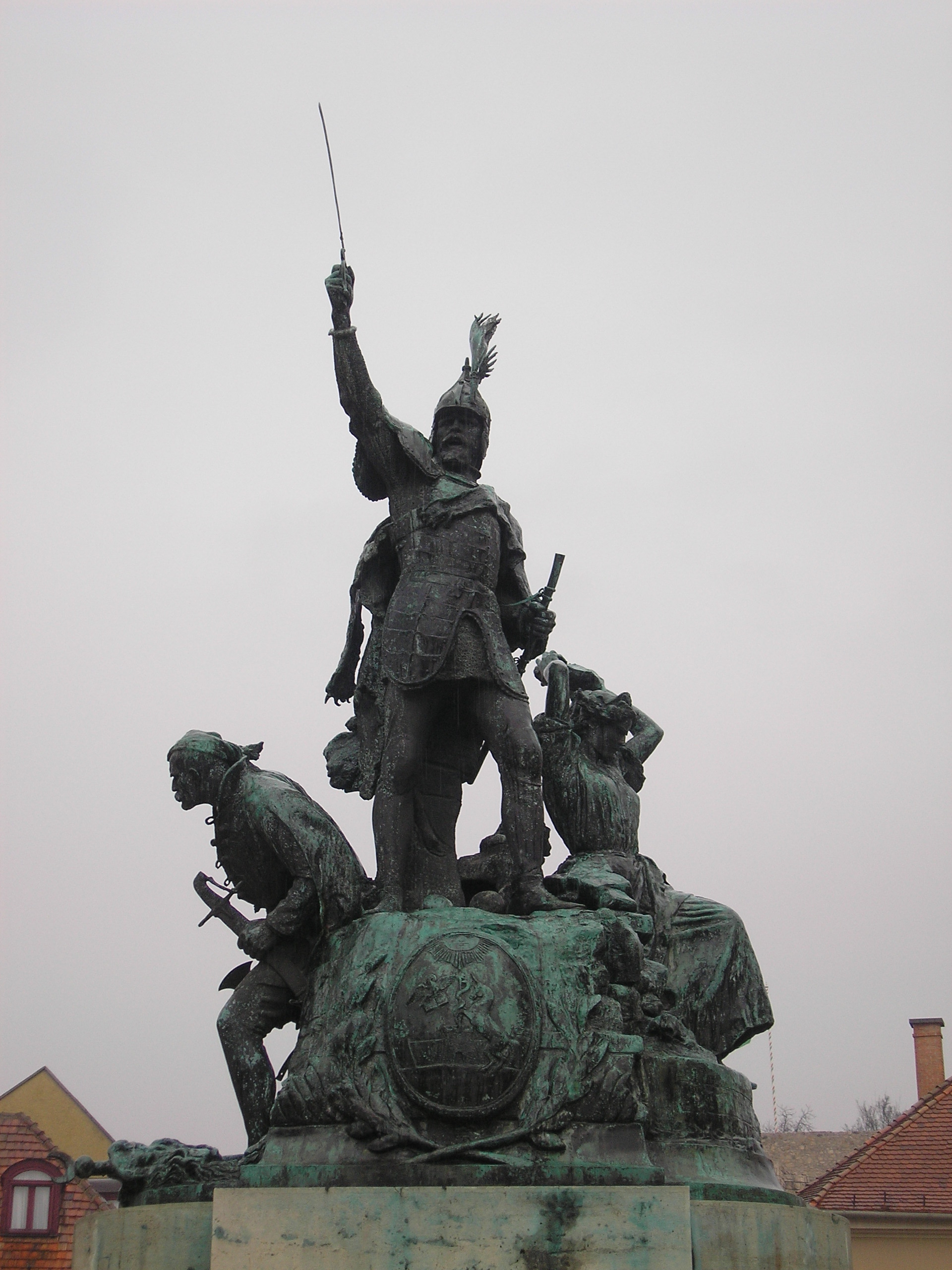 Stróbl Alajos (1907): Dobó István Statue in Eger